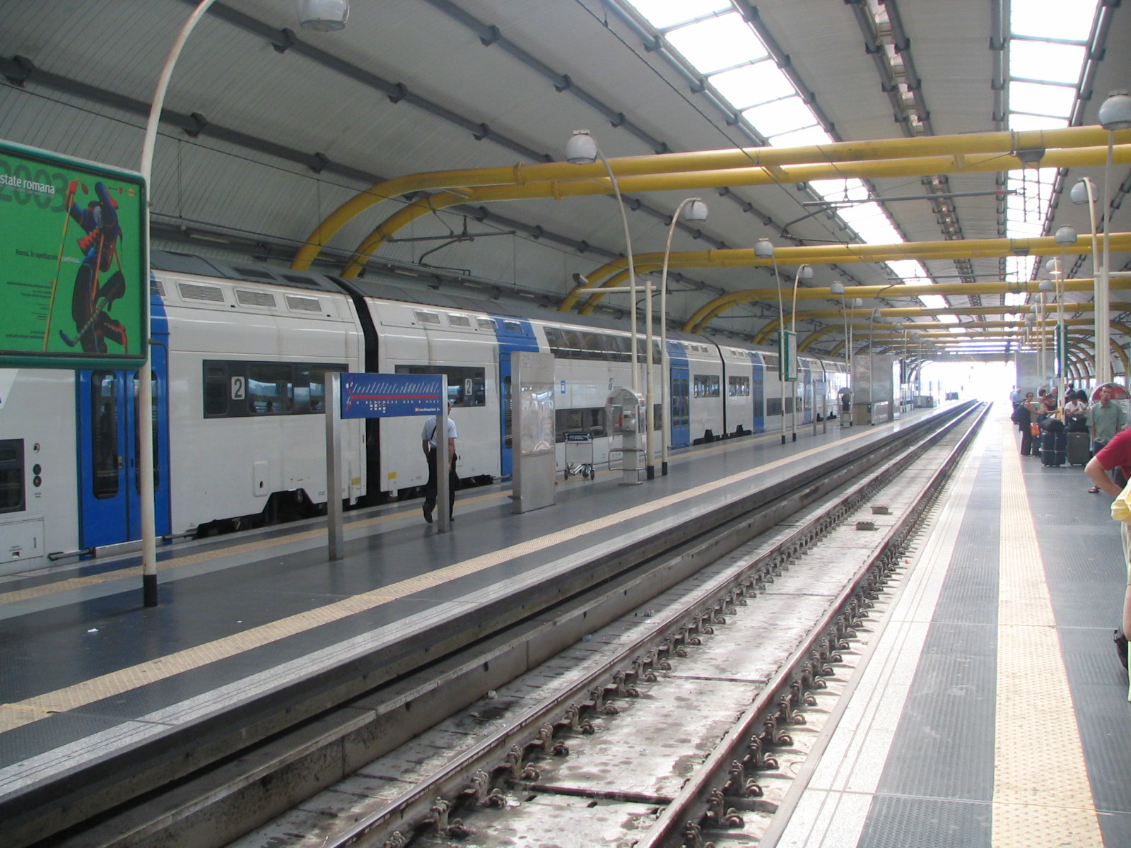 eigen foto. GerardM 10 jul 2004 23:59 (CEST)